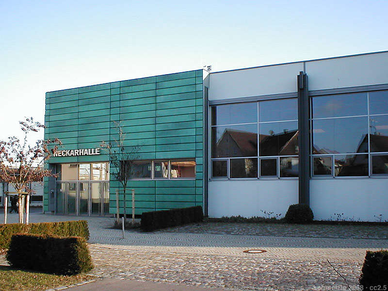 Eingangsbereich der Neckarhalle in Heilbronn-Neckargartach